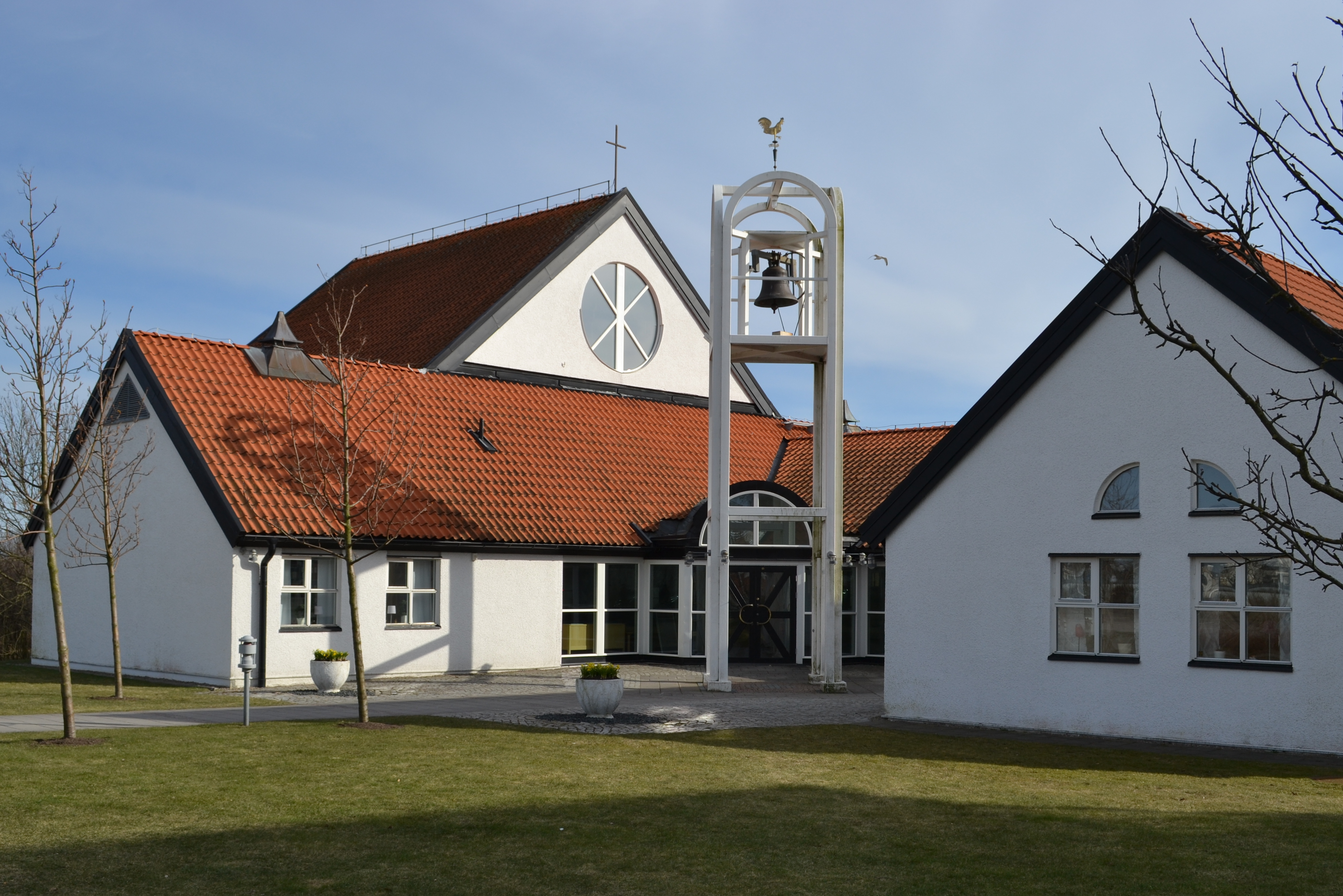 Apelvikshöjds kyrka, Varberg.